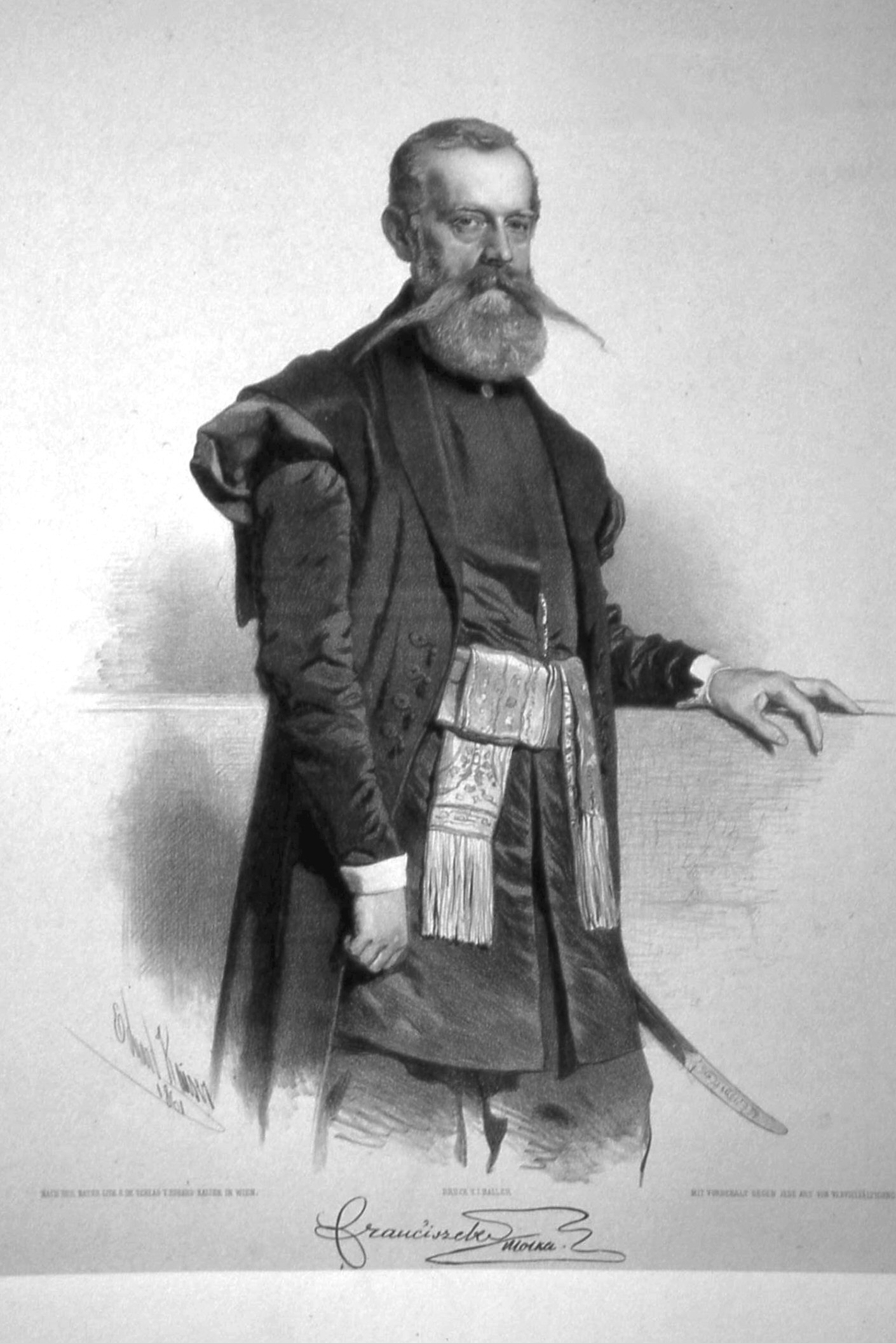 Franciszek Smolka (1810-1899), polnischer Politiker. Lithographie von Eduard Kaiser, 1861